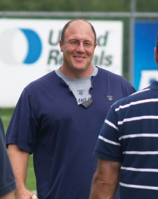 Scott Pioli